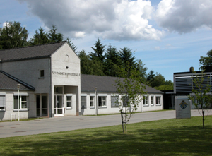 billede af FLOS en dejlig sommerdag